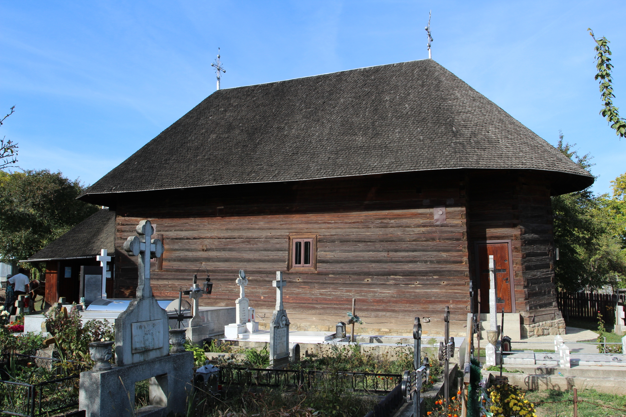 Fosta mănăstire"Peste Vale"